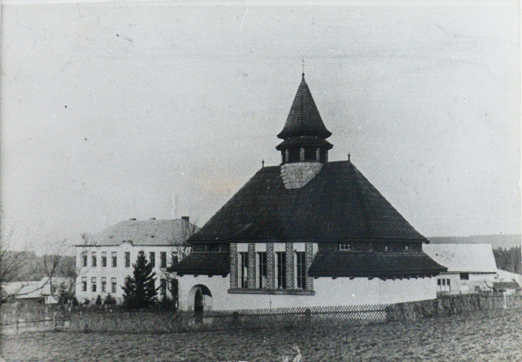 Zaběhlá, římskokatolická kaple. V pozdí je budova školy